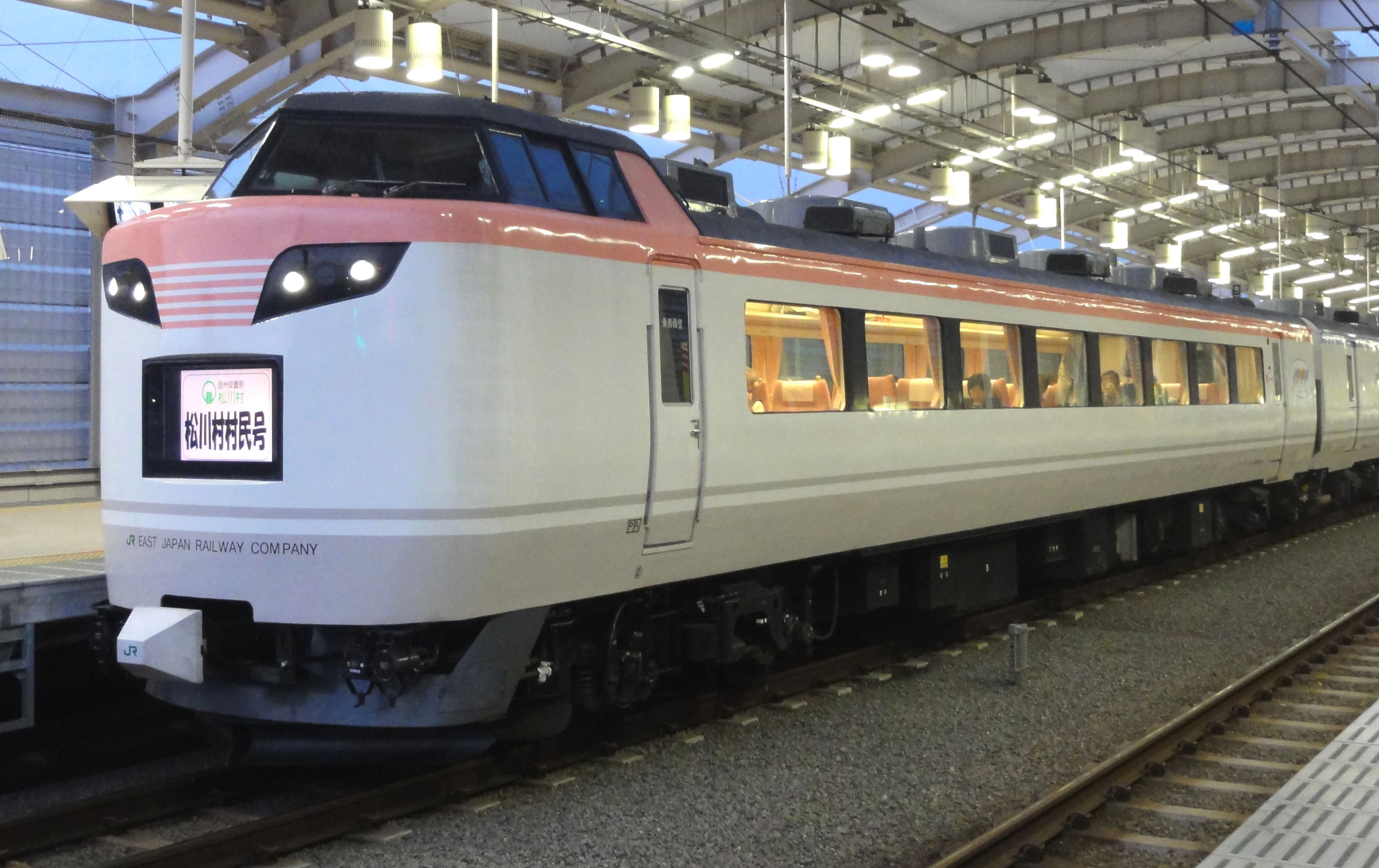 JR東日本 485系「彩（いろどり）」